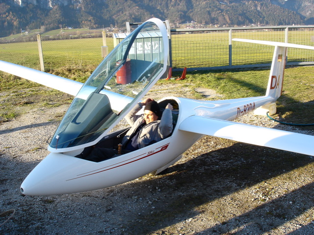 Glasflügel 304